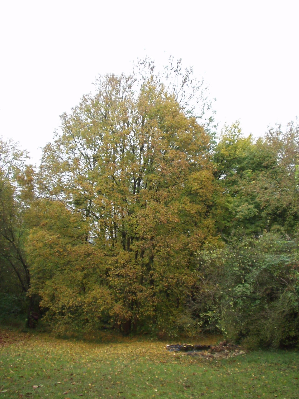 photo taken by myself